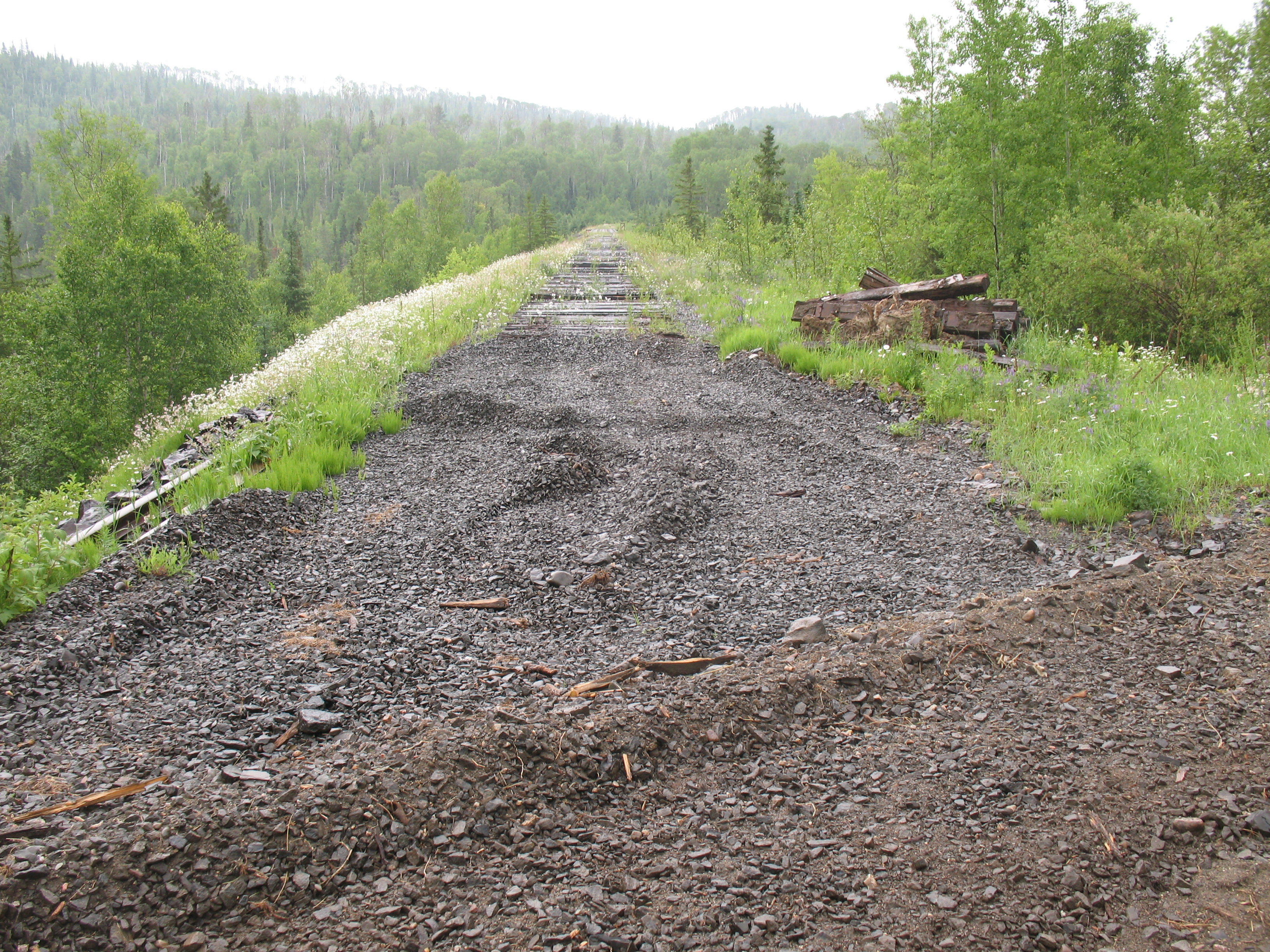 Stillgelegte Eisenbahnstrecke südlich des Lake Nipigon